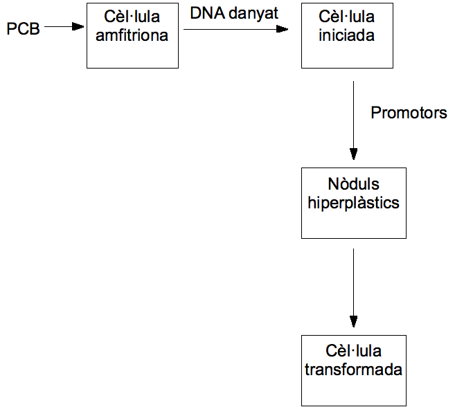 Mecanisme de carcinogènesi pels PBC segons Safe S 1984